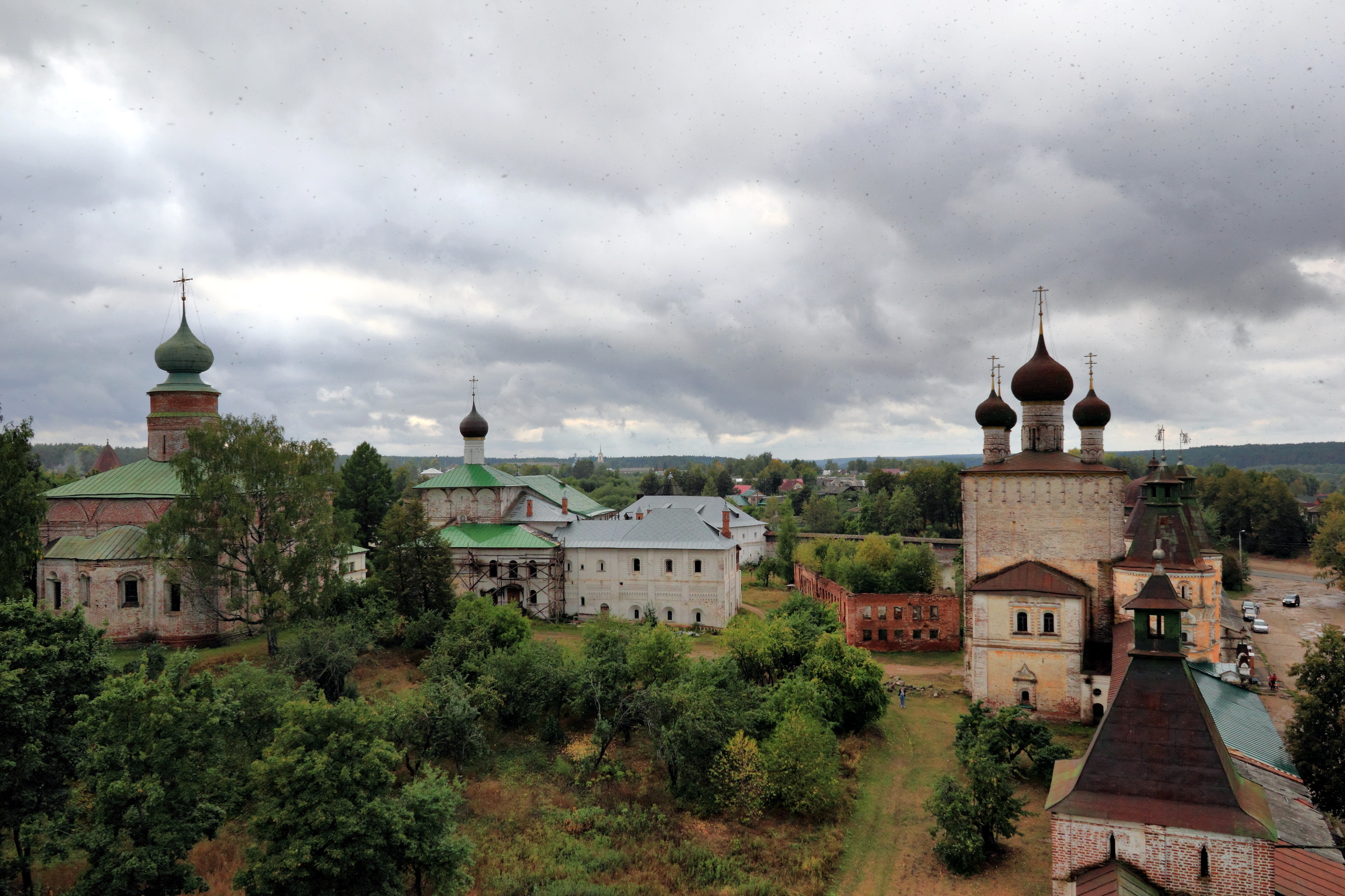 Borisoglebsky Борисоглебский